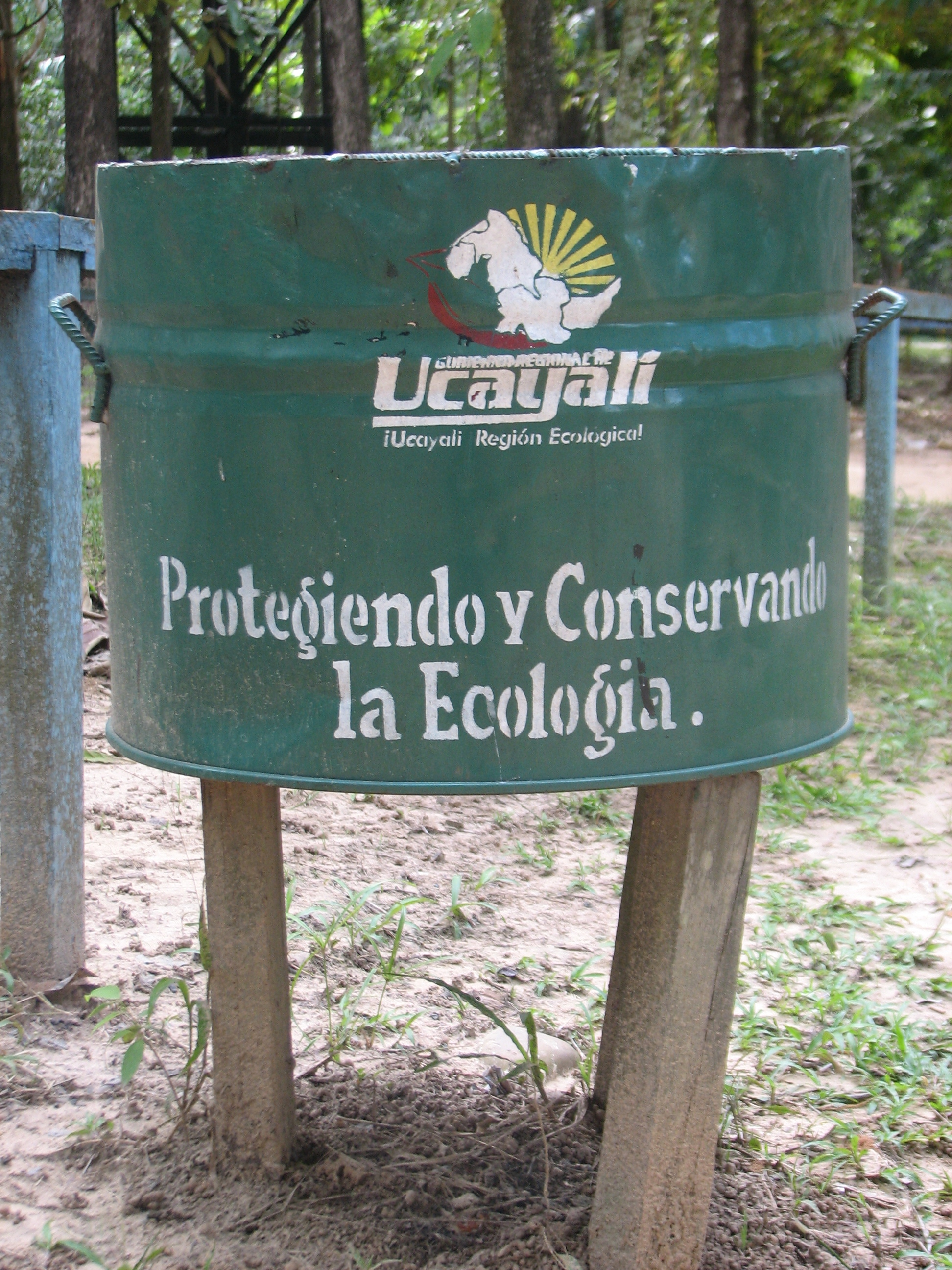 Trash bin in Pucallpa, Parque Natural, Pucallpa/Coronel Portillo/Ucayali, Peru